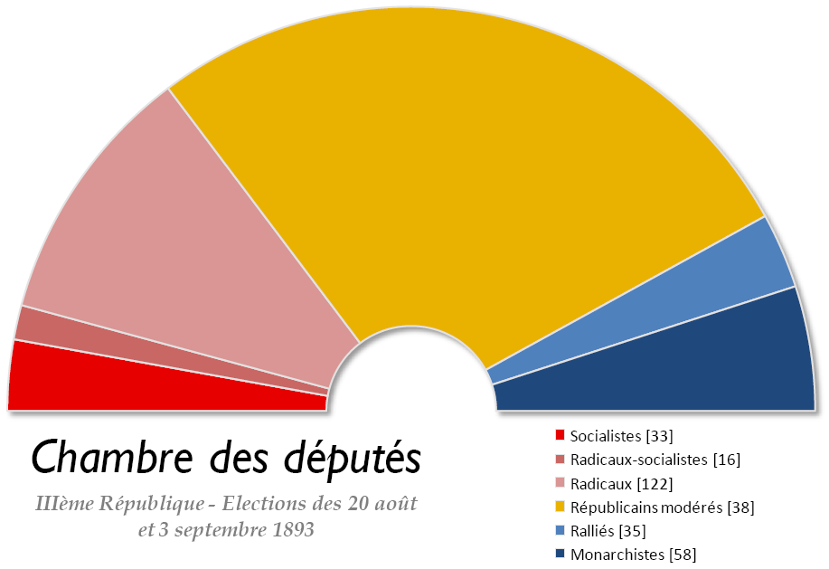 Chambre des députés française issue des élections législatives de 1893